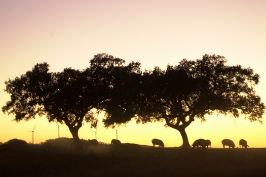 Cerdos Ibericos del pueblo de Tharsis (Huelva).